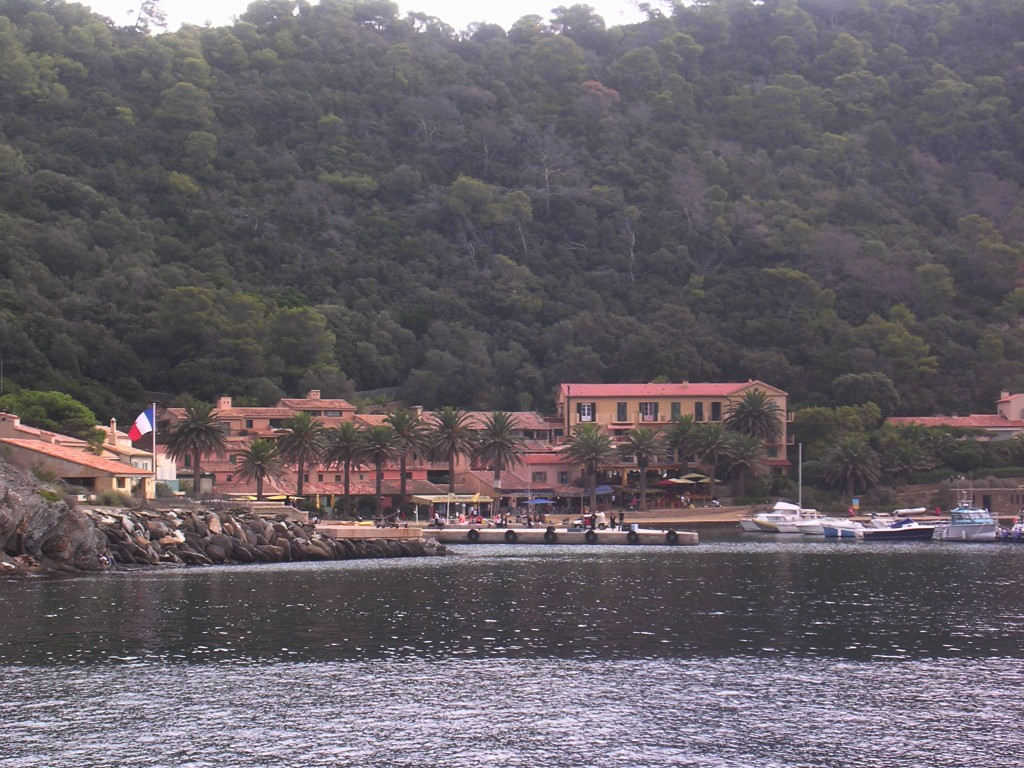 Le port de Port-Cros (Var) France